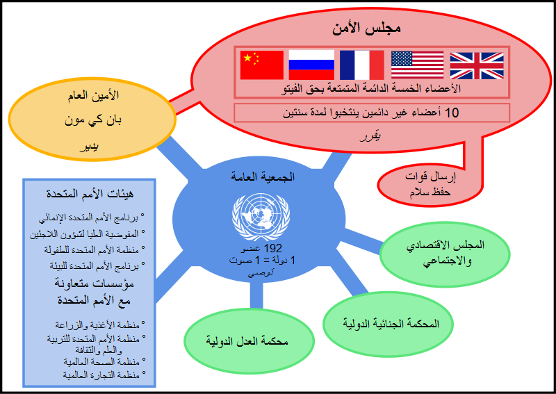 مخطط لهيئة مجلس أمن الأمم المتحدة و هيئات الأمم المتحدة